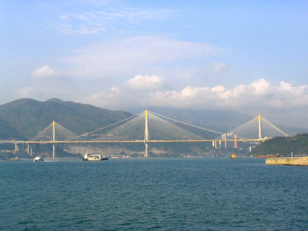 汀九橋 Ting Kau Bridge